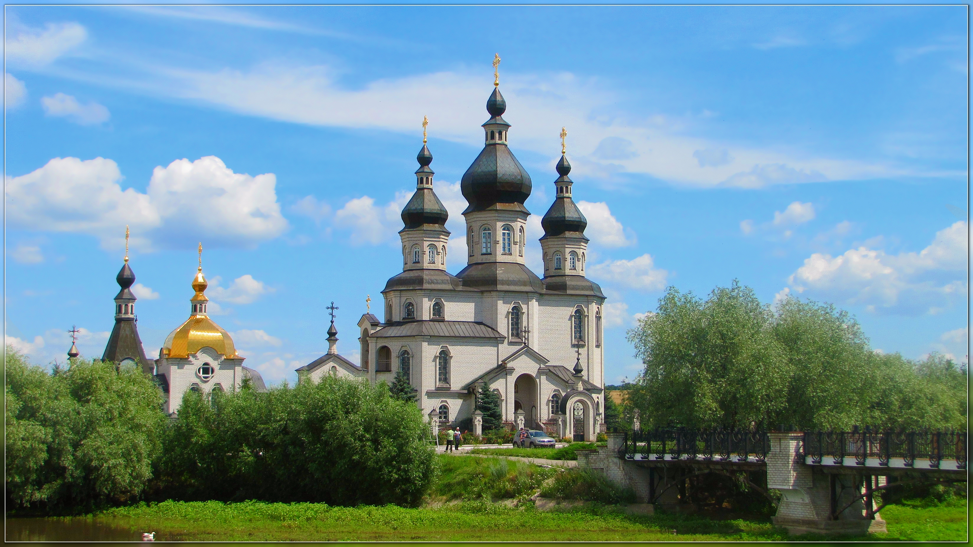 Свято-Миколаївський храм (село Чернещина, Борівського району Харківської області)